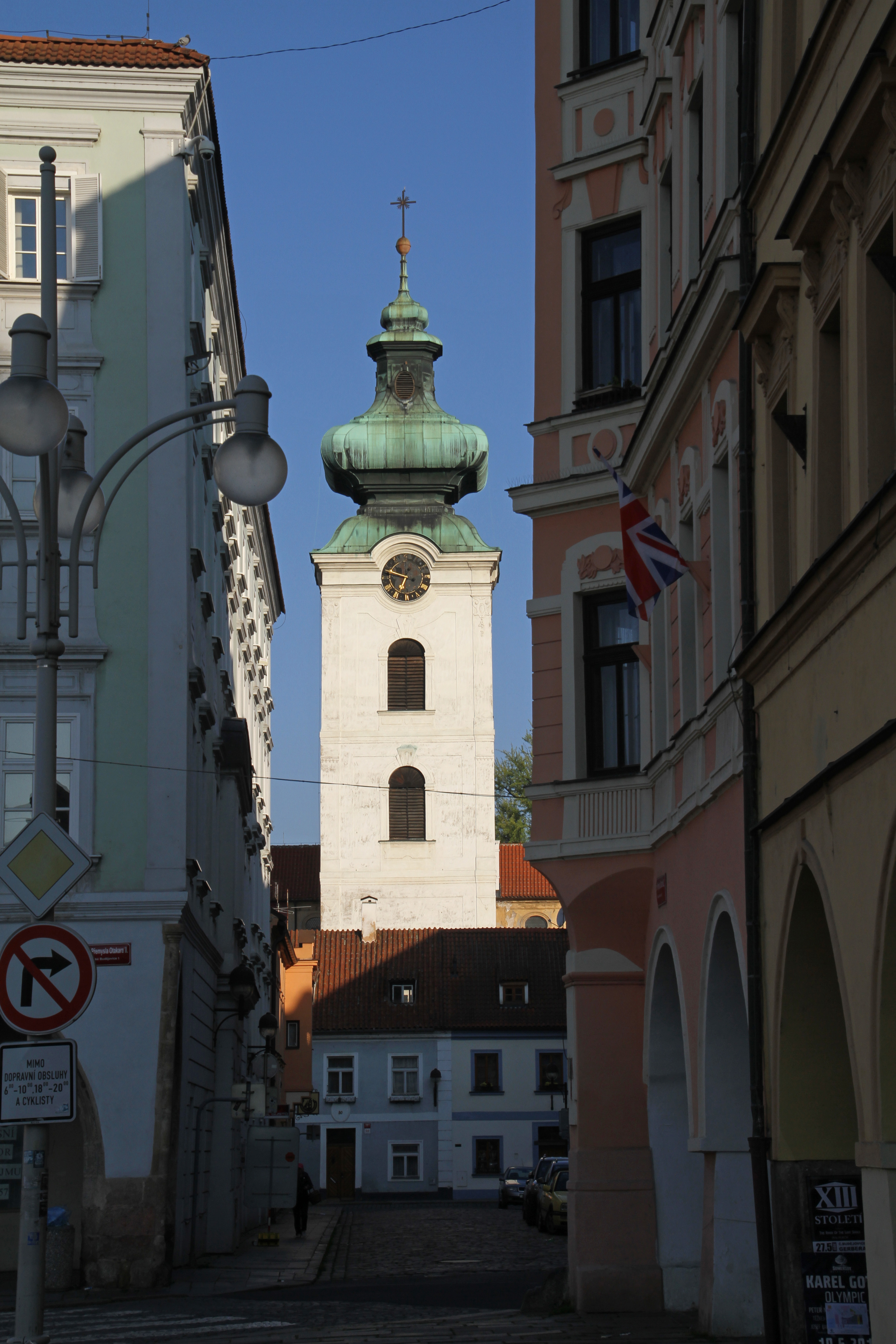 Dominikánský konvent v Českých Budějovicích